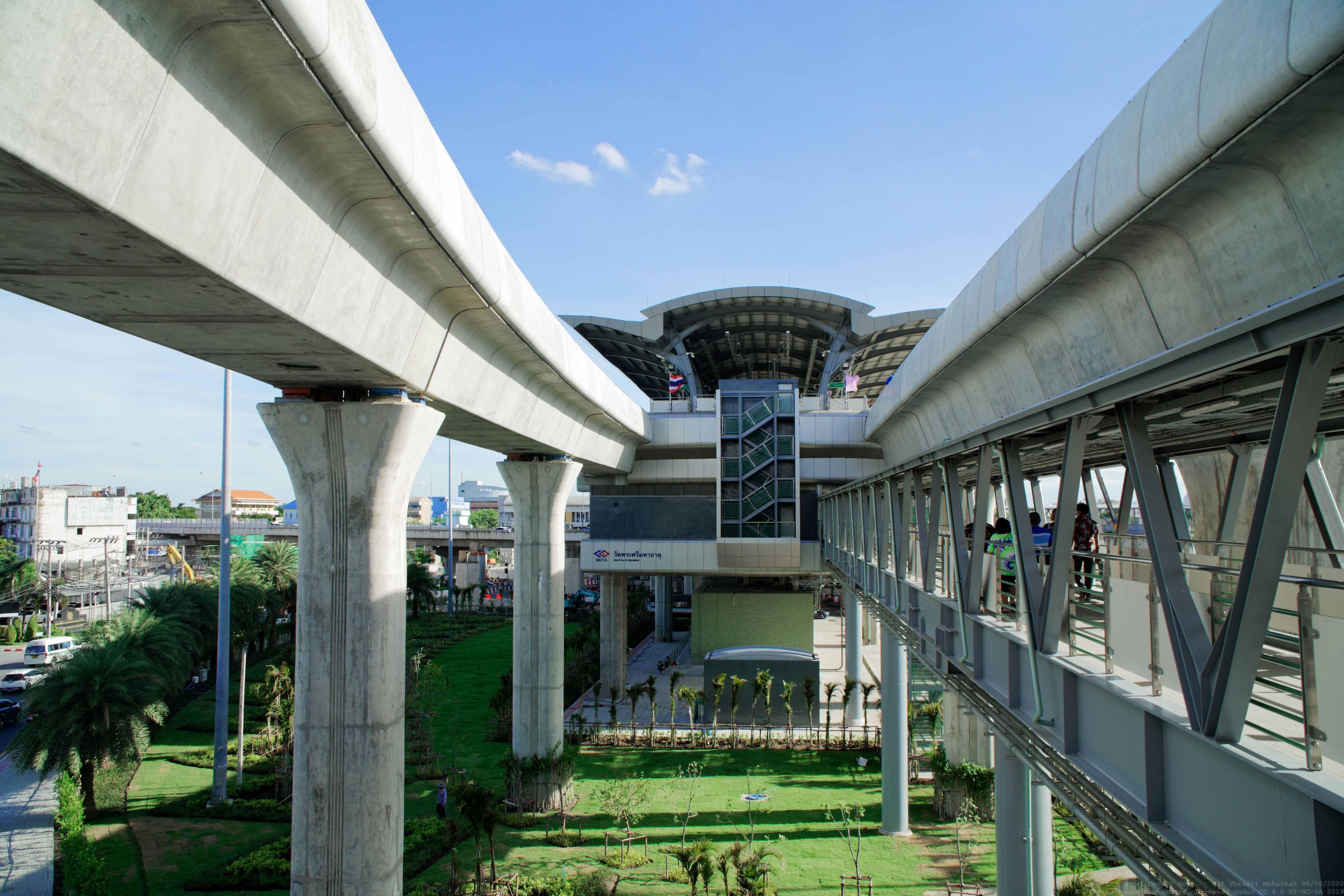 สถานีอนุสาวรีย์พิทักษ์รัฐธรรมนูญ มองจากทางเข้าด้านทิศเหนือ